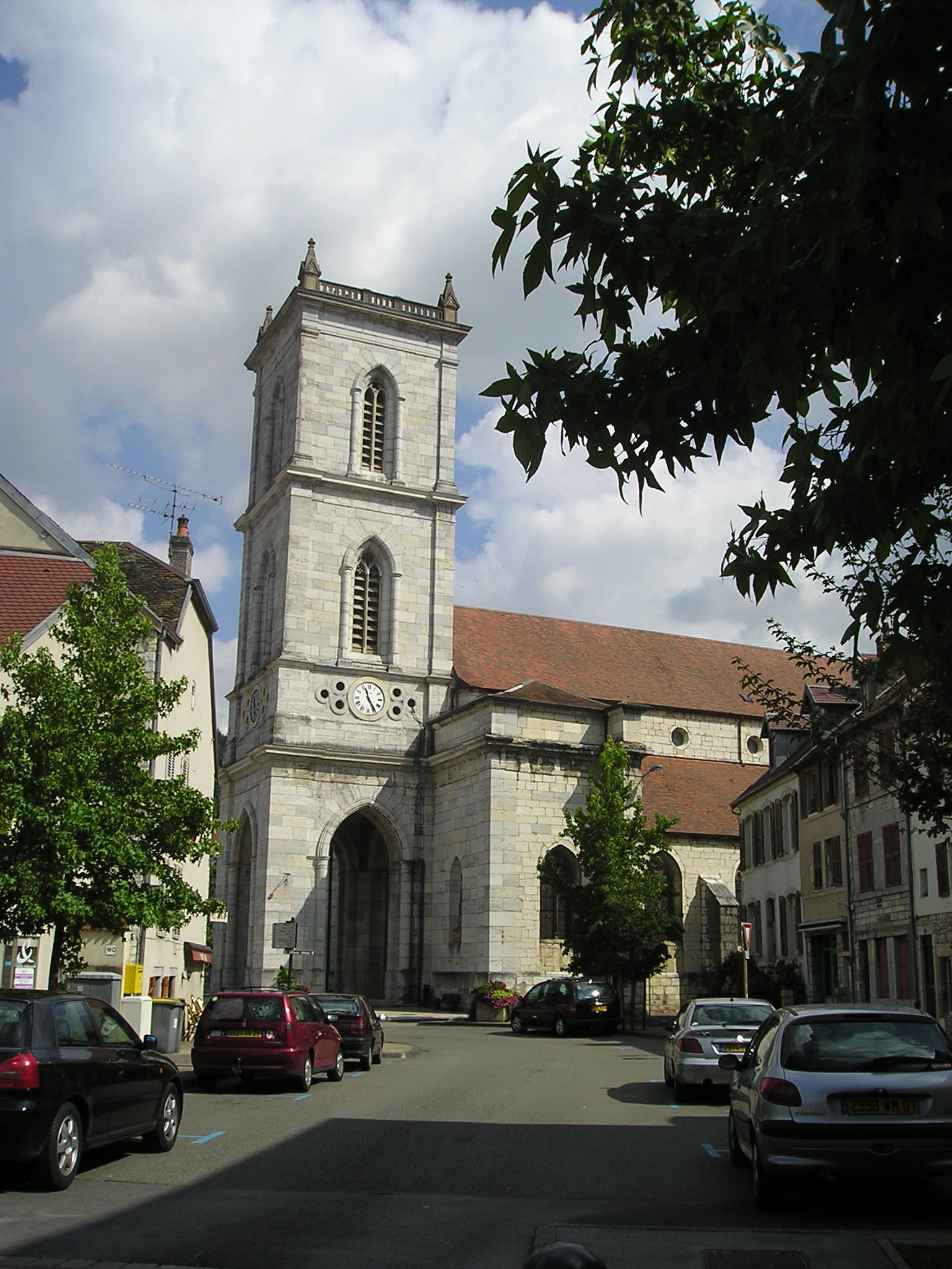 Baume-les-Dames, Saint-Martin außen